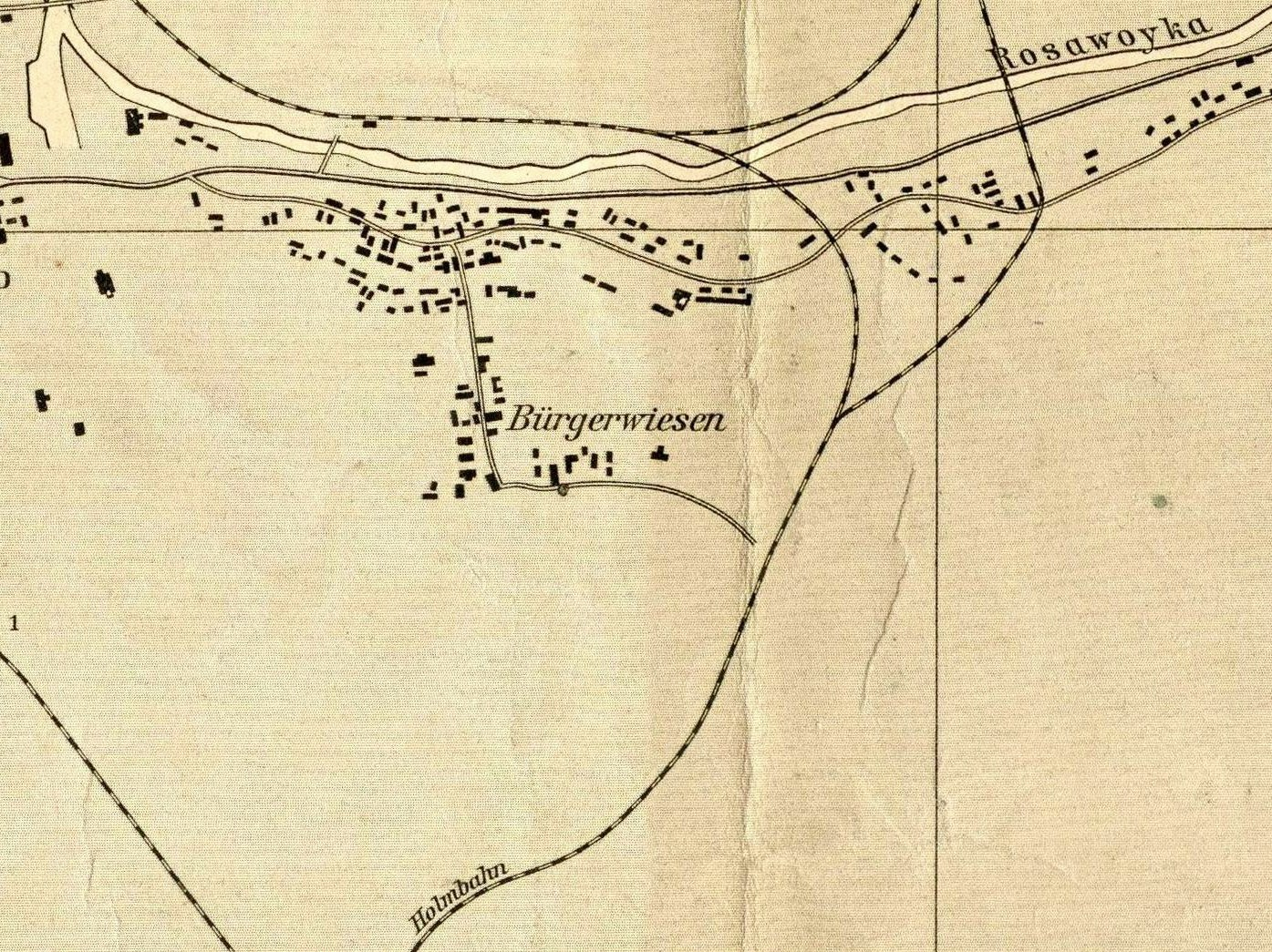 Gdańsk Błonia.